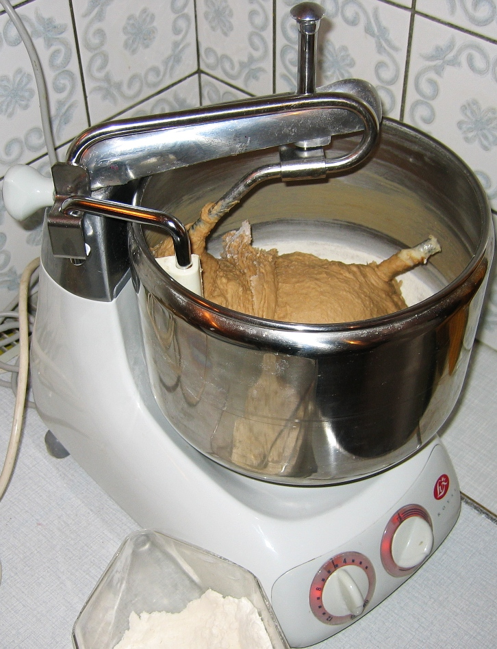 Küchenmaschine des Fabrikates "Lux" in der Konfiguration als Rührgerät, hier für die Zubereitung eines Sauerteiges.